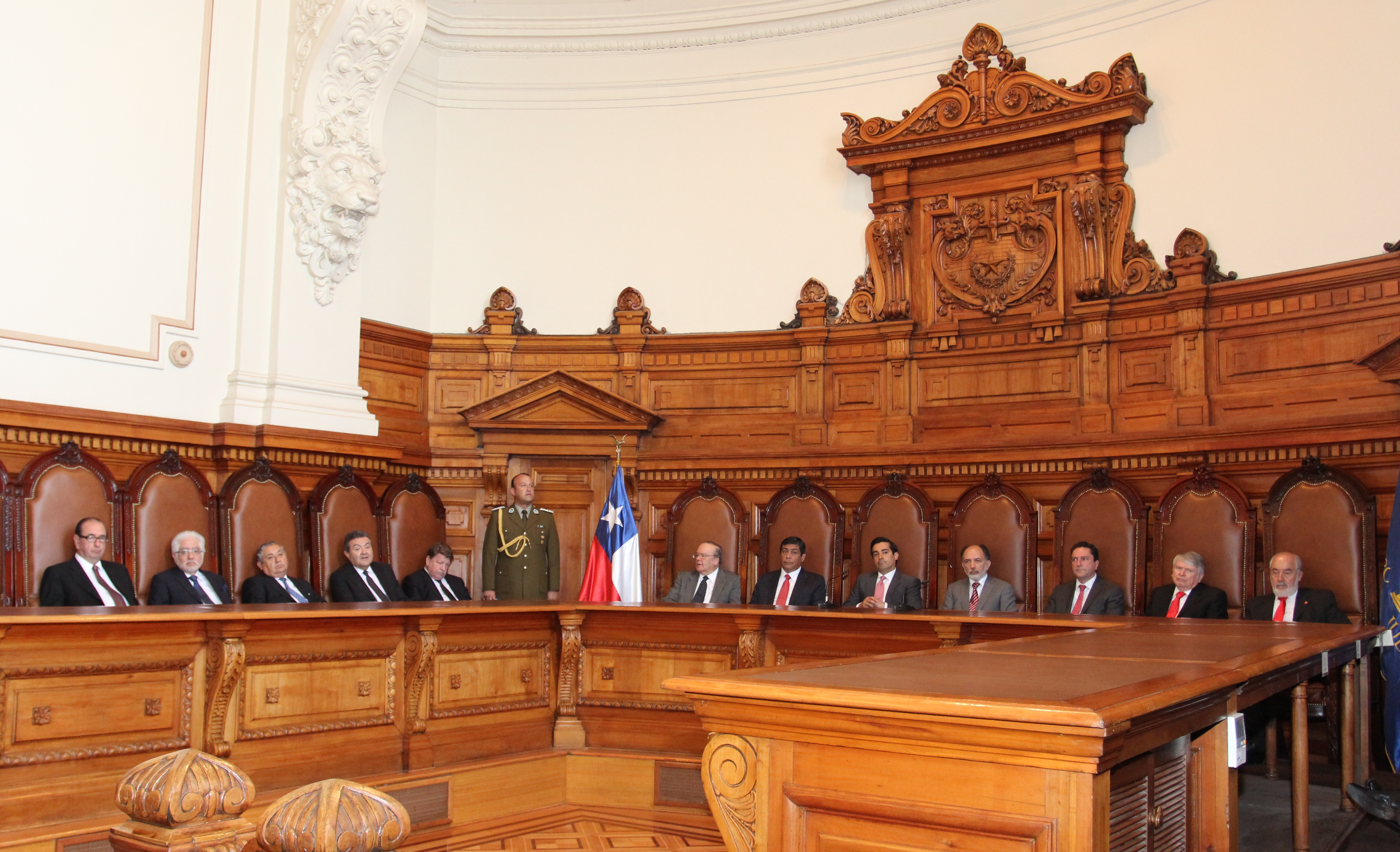 Bienes Nacionales destina nuevos inmuebles fiscales para el Poder Judicial